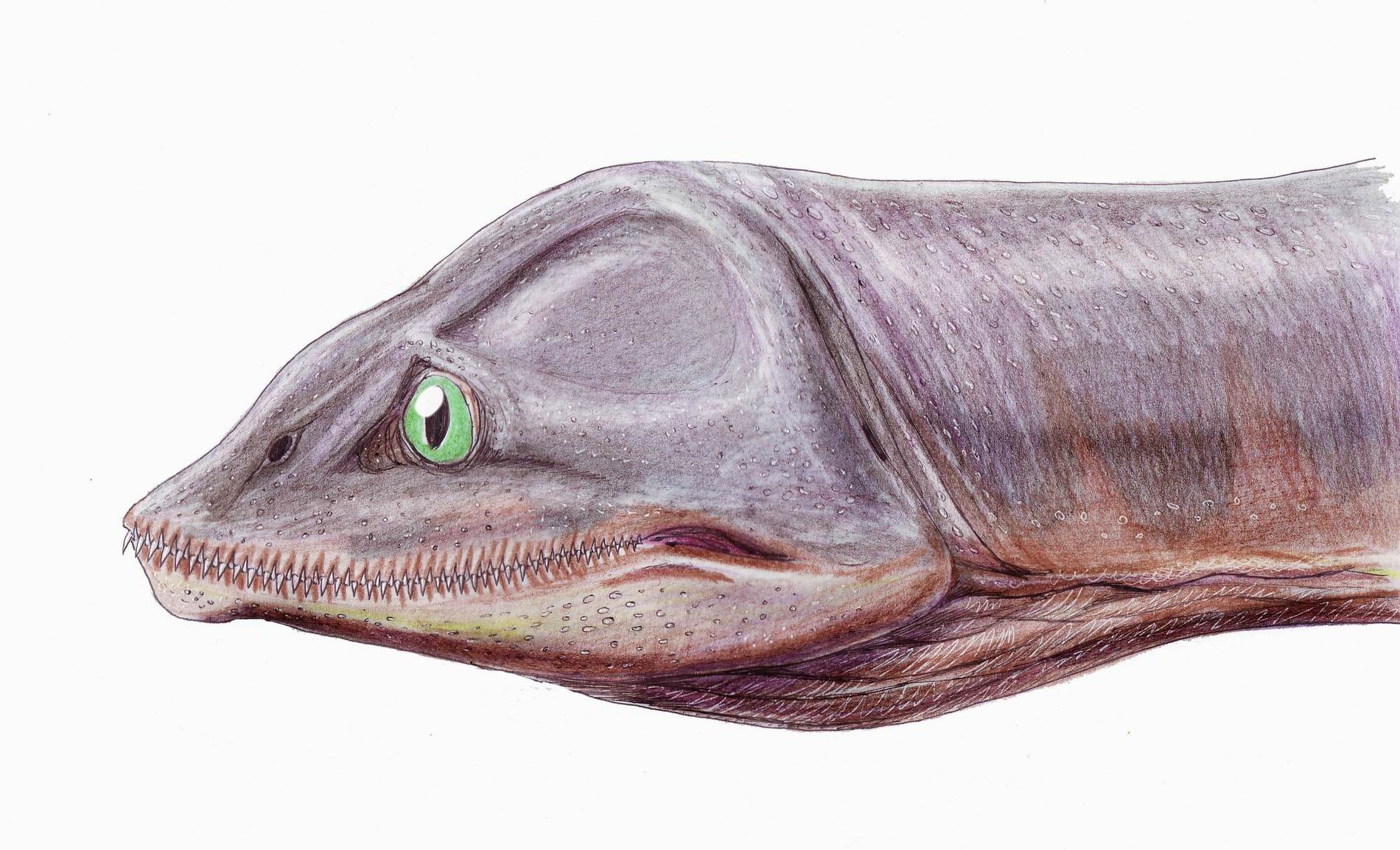 Head of Kaiwhekea katiki